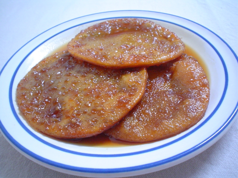 "Sopaipillas pasadas": sopaipillas pasadas por almíbar de azúcar y mieles, llamada Chancaca, especiado con naranjas, canela y clavo de olor.